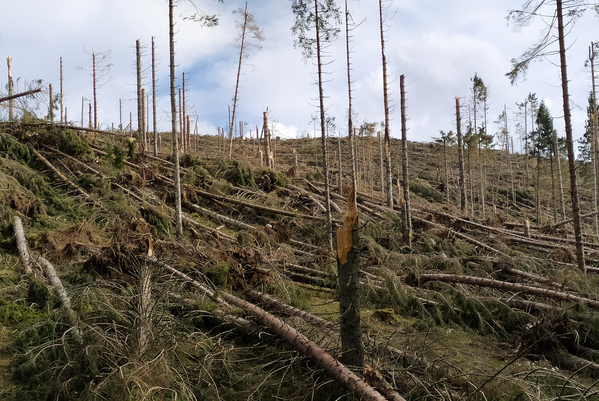 Danni causati dalla tempesta VAIA sull'Altopiano dei Sette Comuni